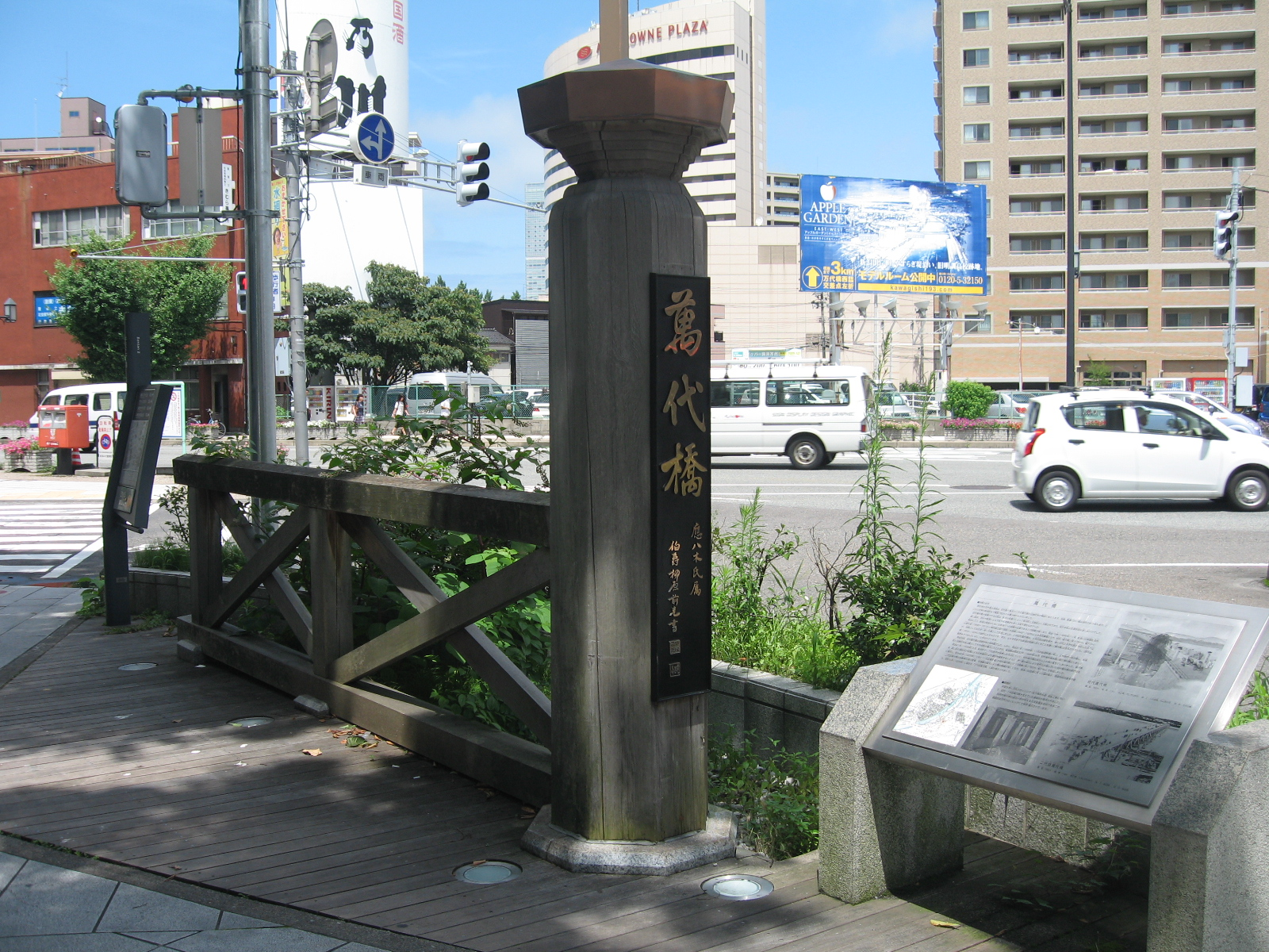 新潟市中央区。流作場五叉路に設置されている、旧萬代橋の親柱。